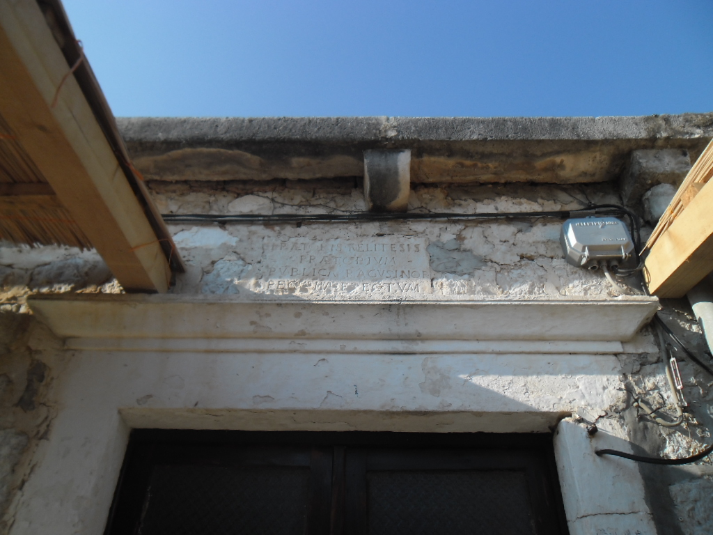 natpis na latinskom poviše ulaza u Knežev dvor u Babinom polju na Mljetu, izgradila Dubrovačka Republika 1554.